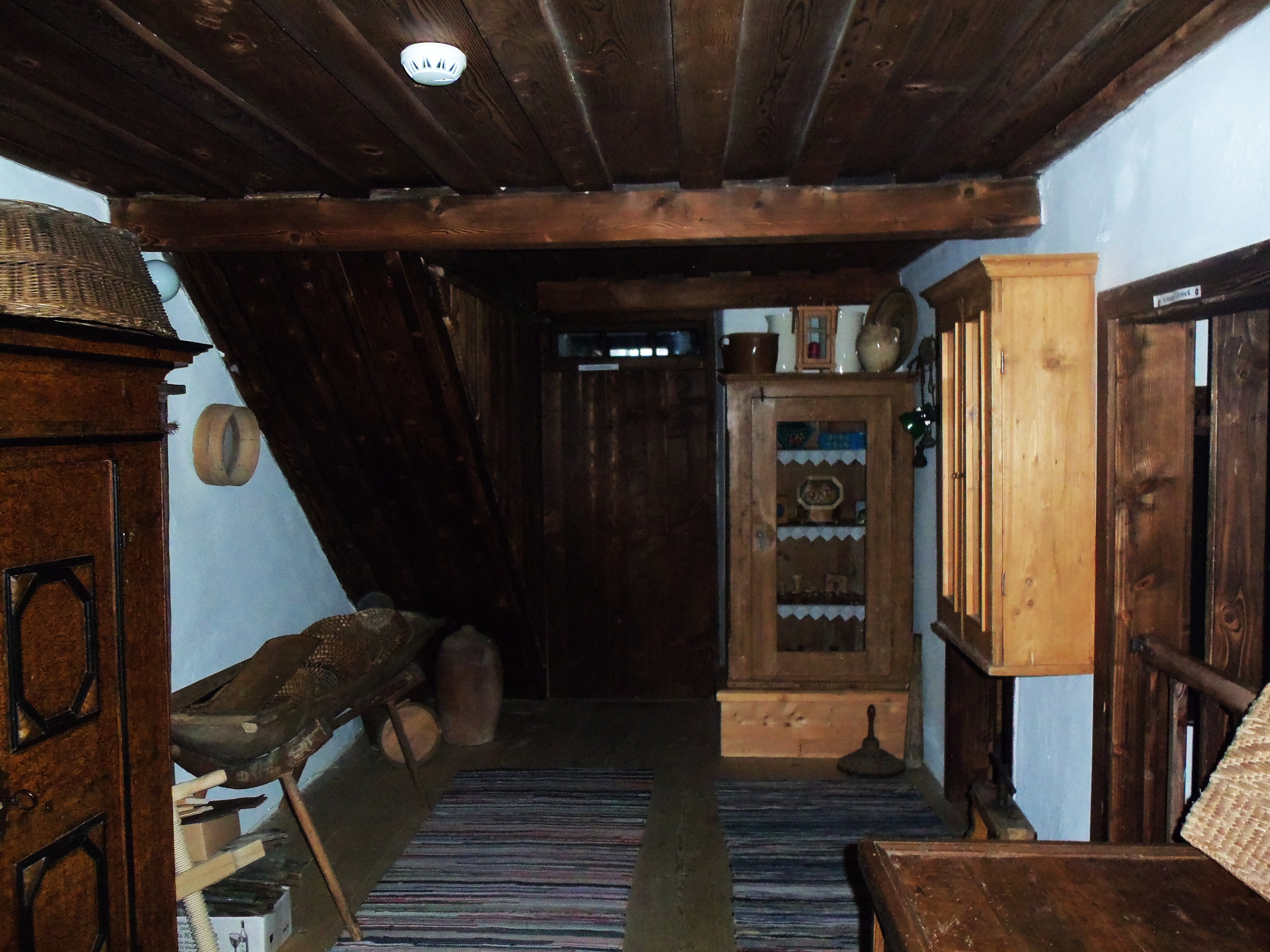 Heimathaus, das Vorhaus